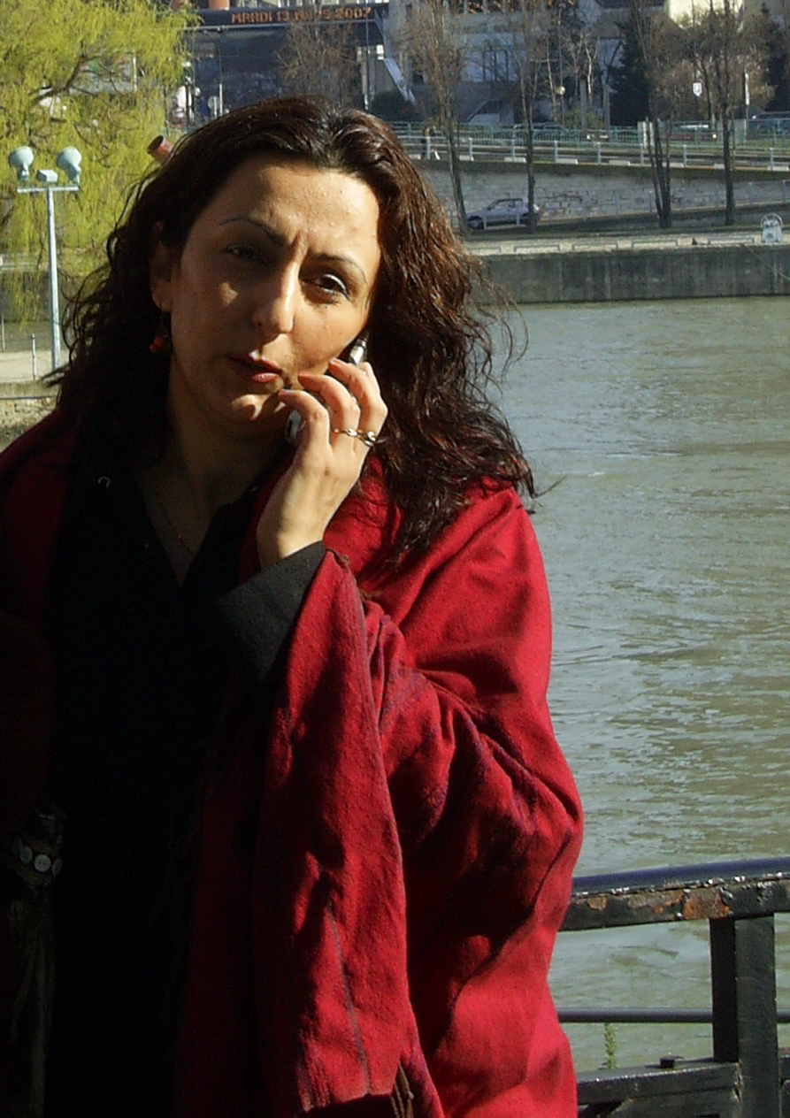 Houzan Mahmoud, Iraqi feminist, in Paris, march 2007.